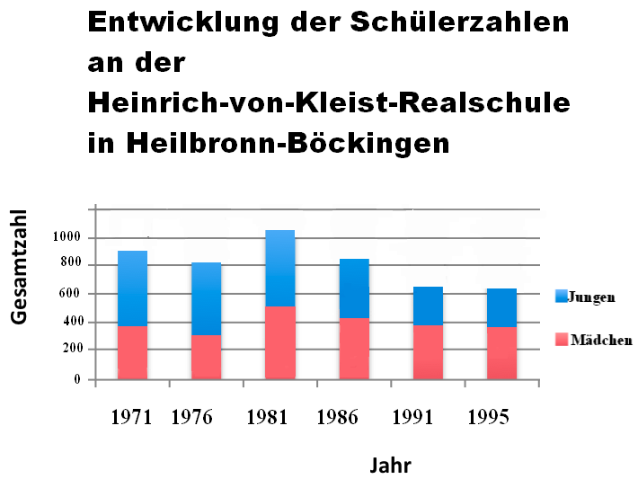 Modifizierte Ausgabe aus der unten genannten Quelle